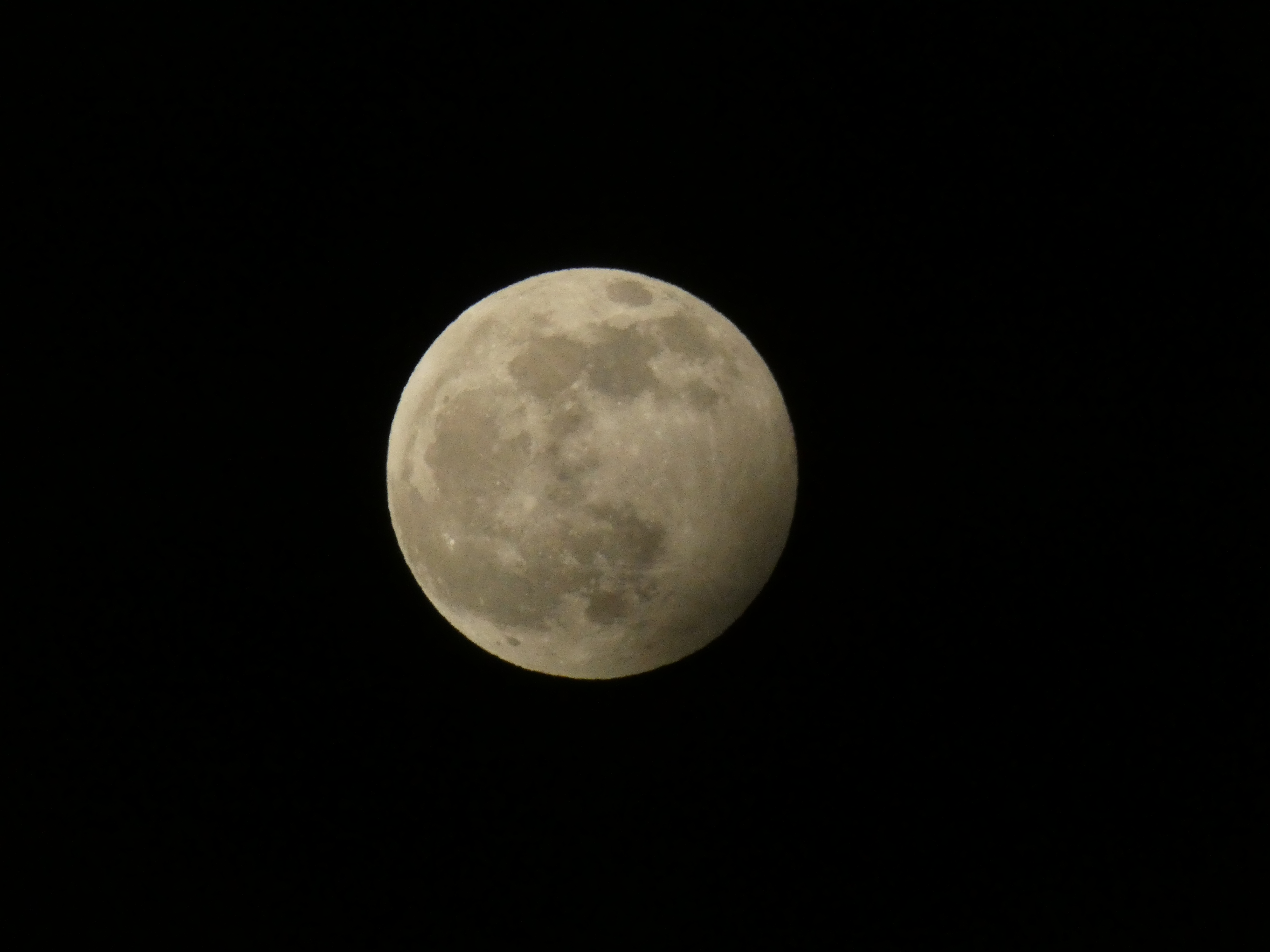 Eclipse lunar prenumbral del 10 de enero de 2020 en Pamplona, España